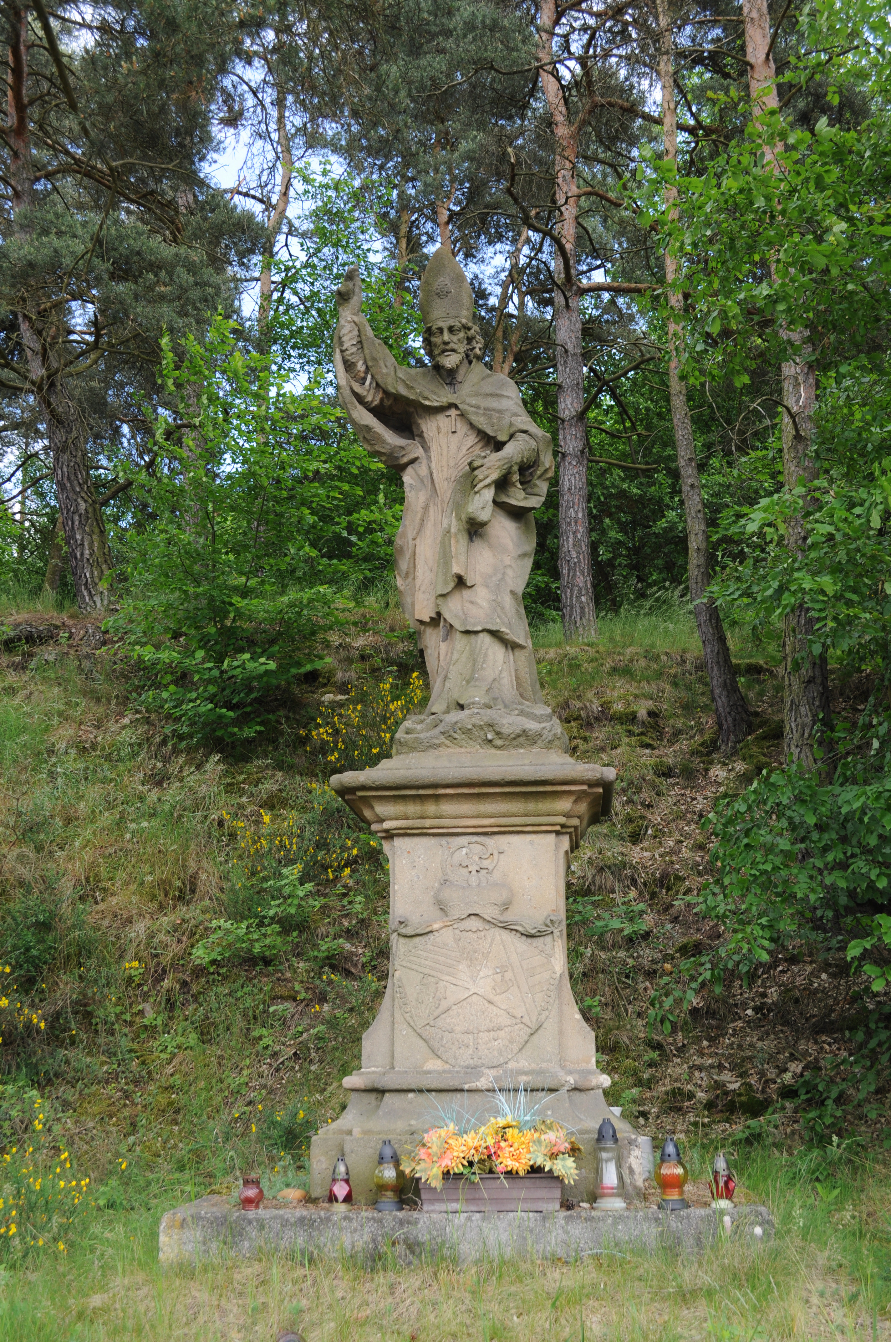 Socha svatého Raimunda, poblíž hřbitova při silnici na Plzeň, Manětín.